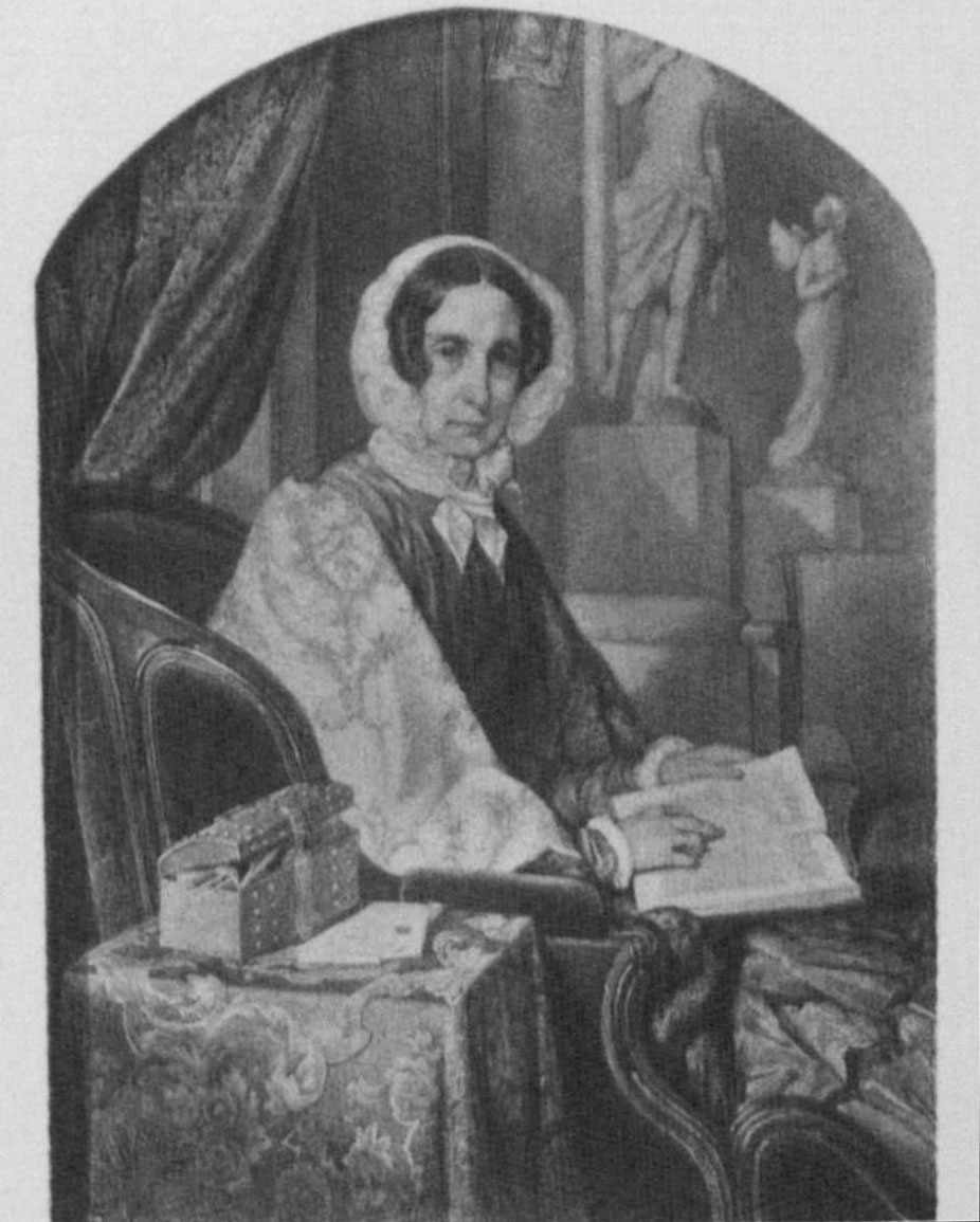 Авдотья Васильевна Левашова, ур. Пашкова (1798-1868), вторая жена генарала В.В.Левашова.